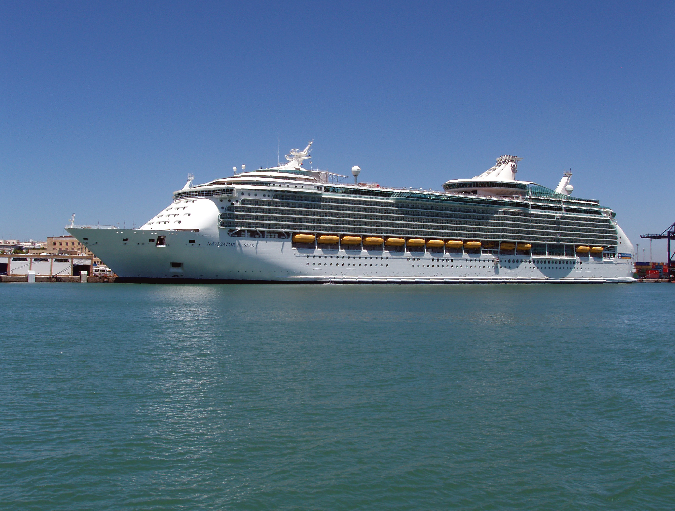 Navigator of the Seas, bandera de Bahamas, 311 m de eslora, en el Puerto de la Bahía de Cádiz